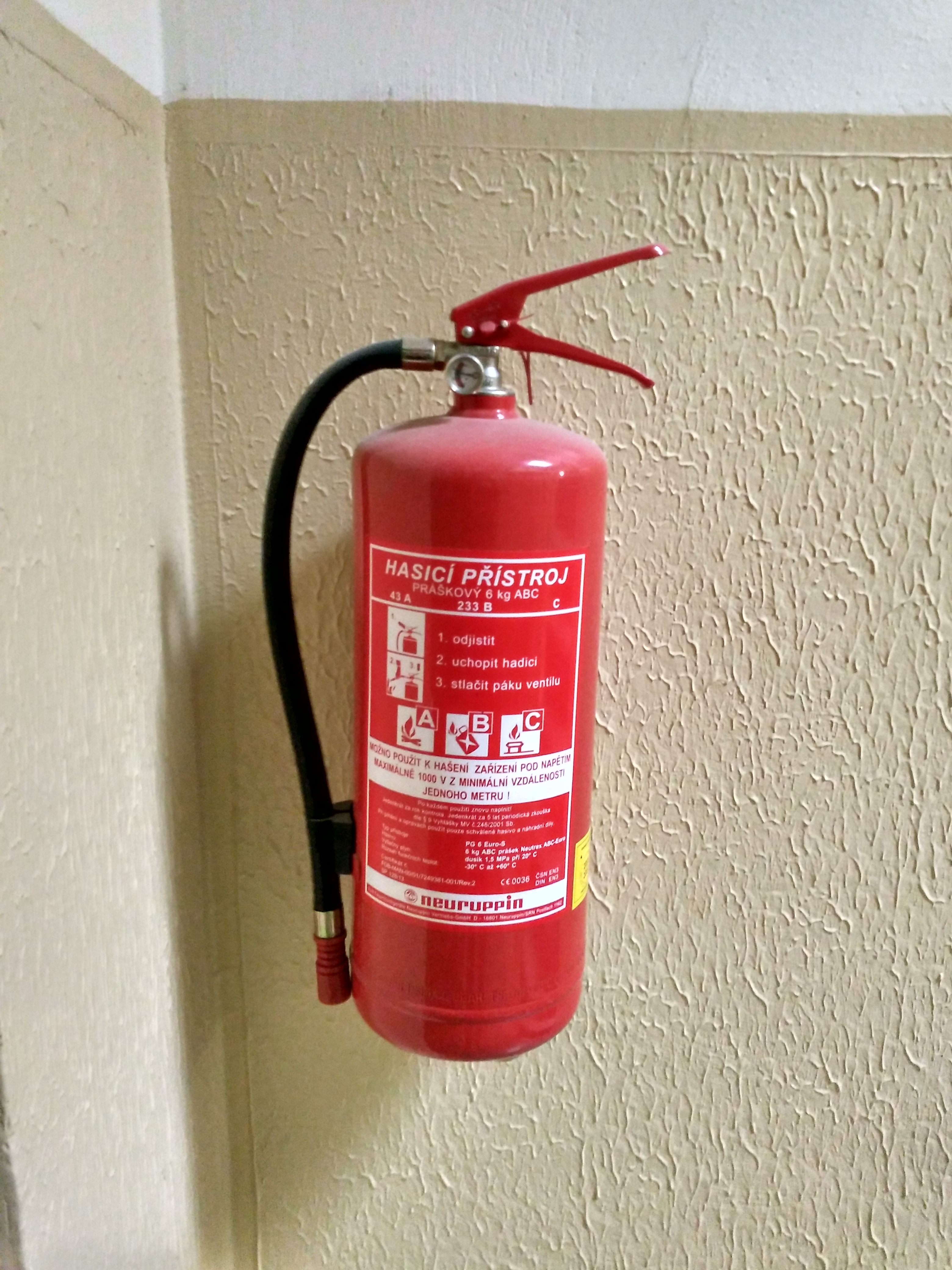 fire extinguisher in Czech Republic